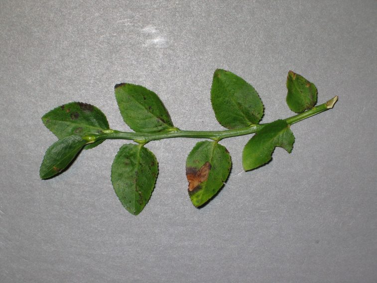 Mine von Stigmella myrtillella